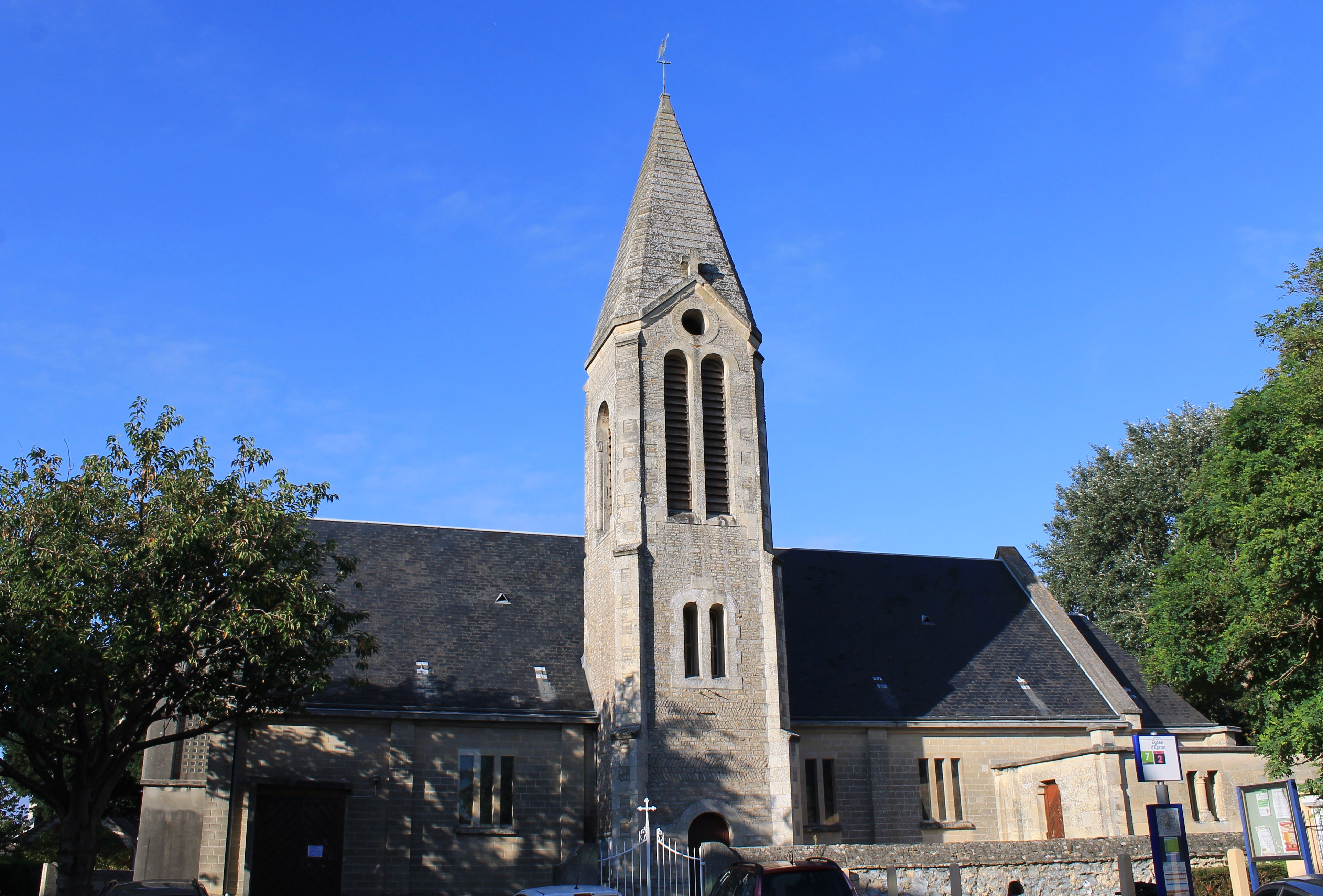 Église Saint-Ursin à Épron (Calvados)